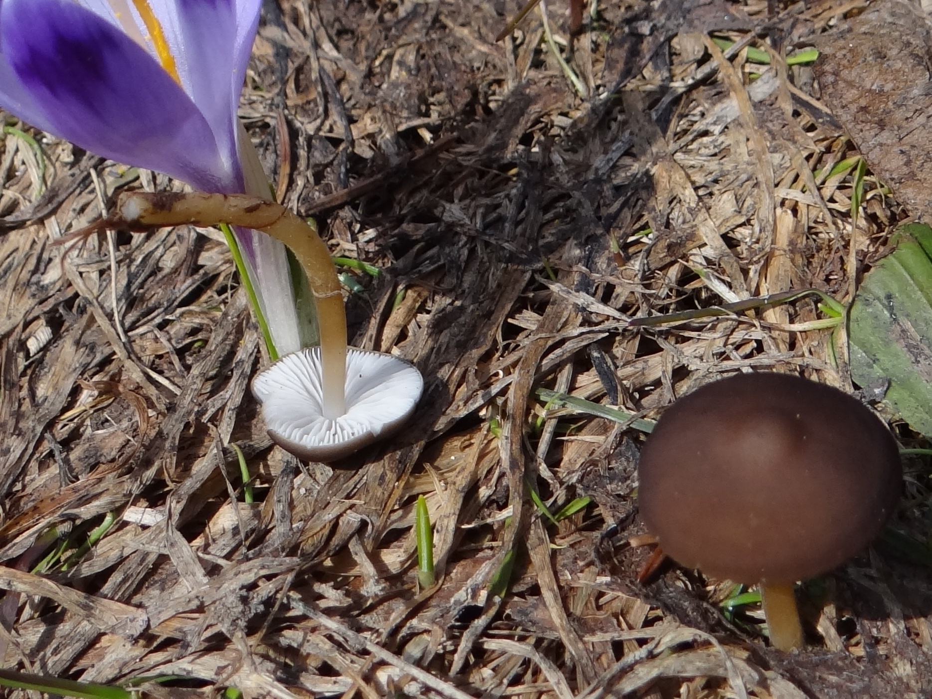 Strobilurus esculentus (habitat:Gorce)